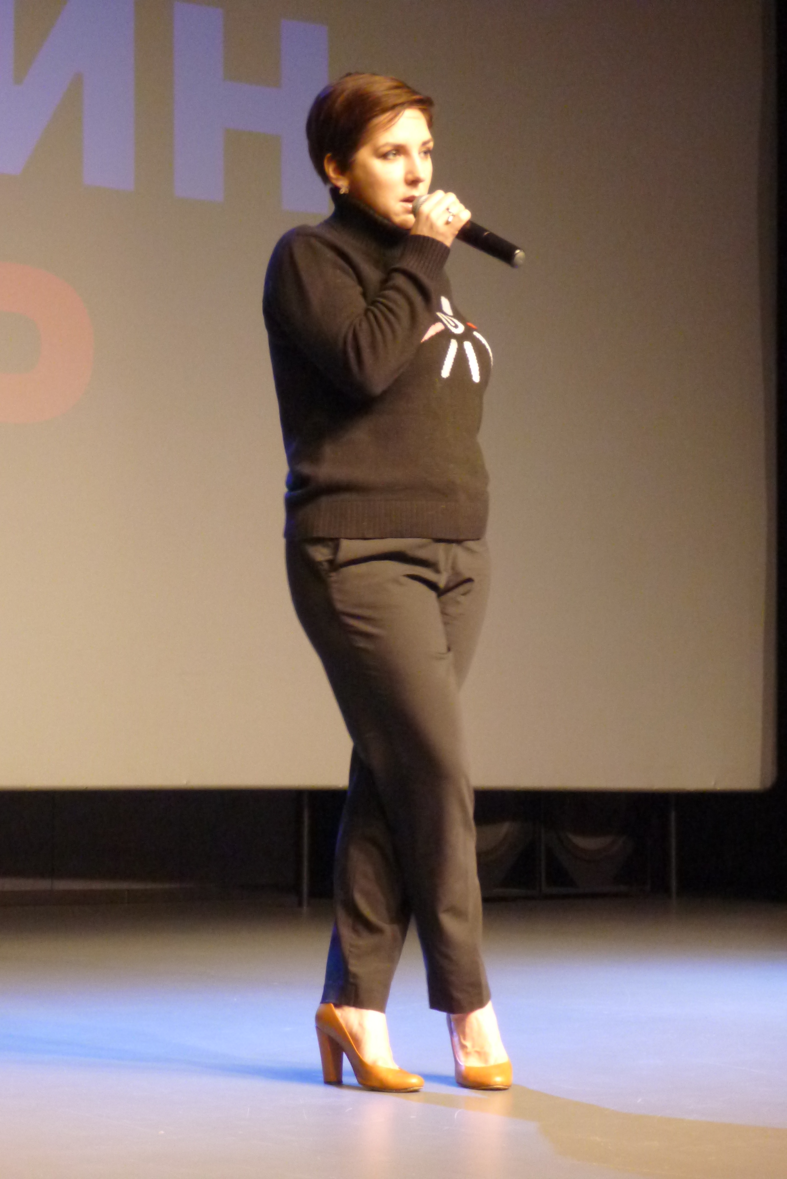 Катерина Гордеева в Ельцин-центре 27 января 2019 года